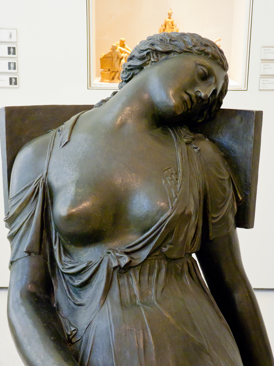 Barcelona Modernismo 950 05 de julio de 2011